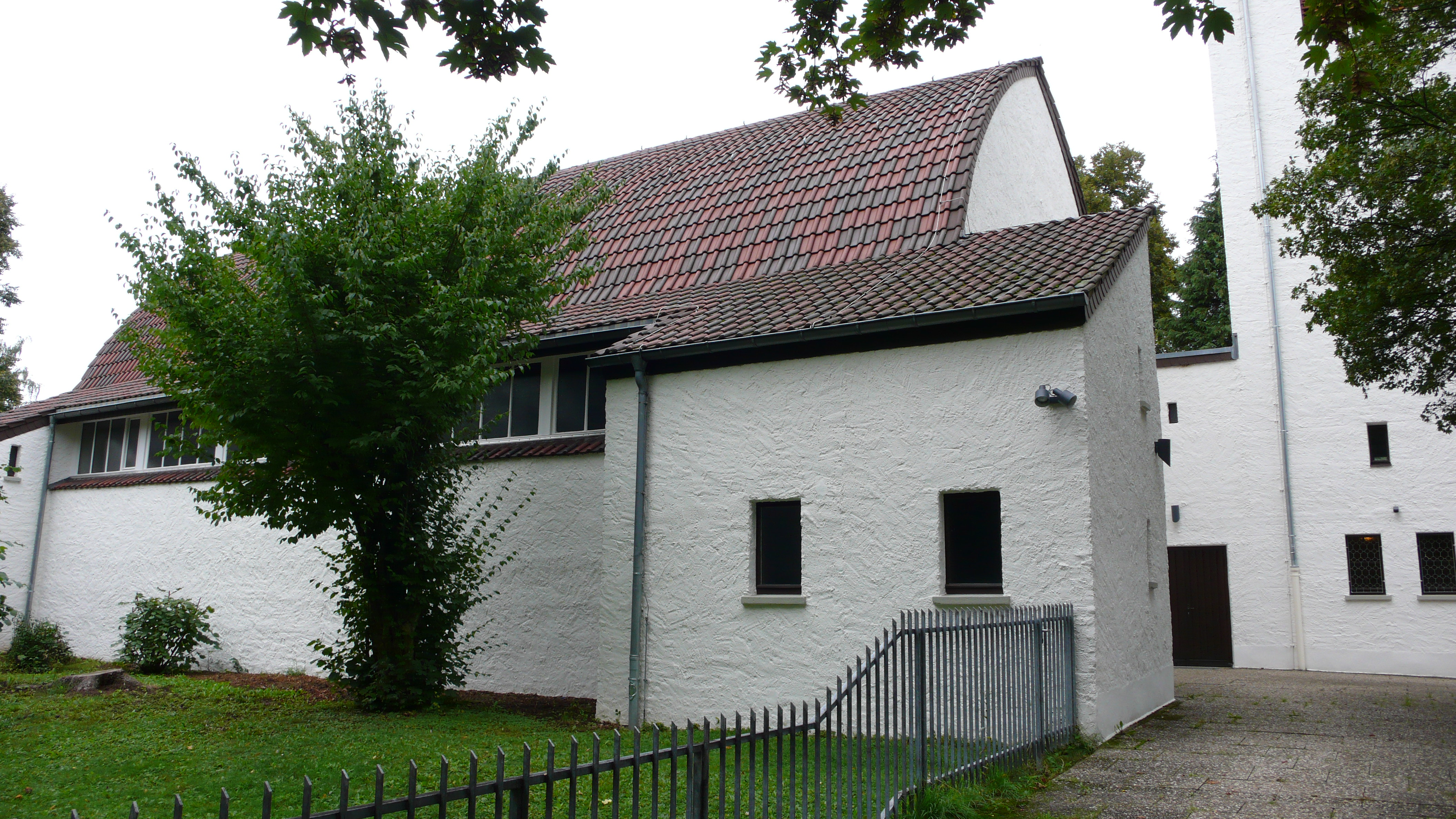 Bethanienkirche in Frankfurt am Main, eine der mehr als 40 Notkirchen des Architekten Otto Bartning